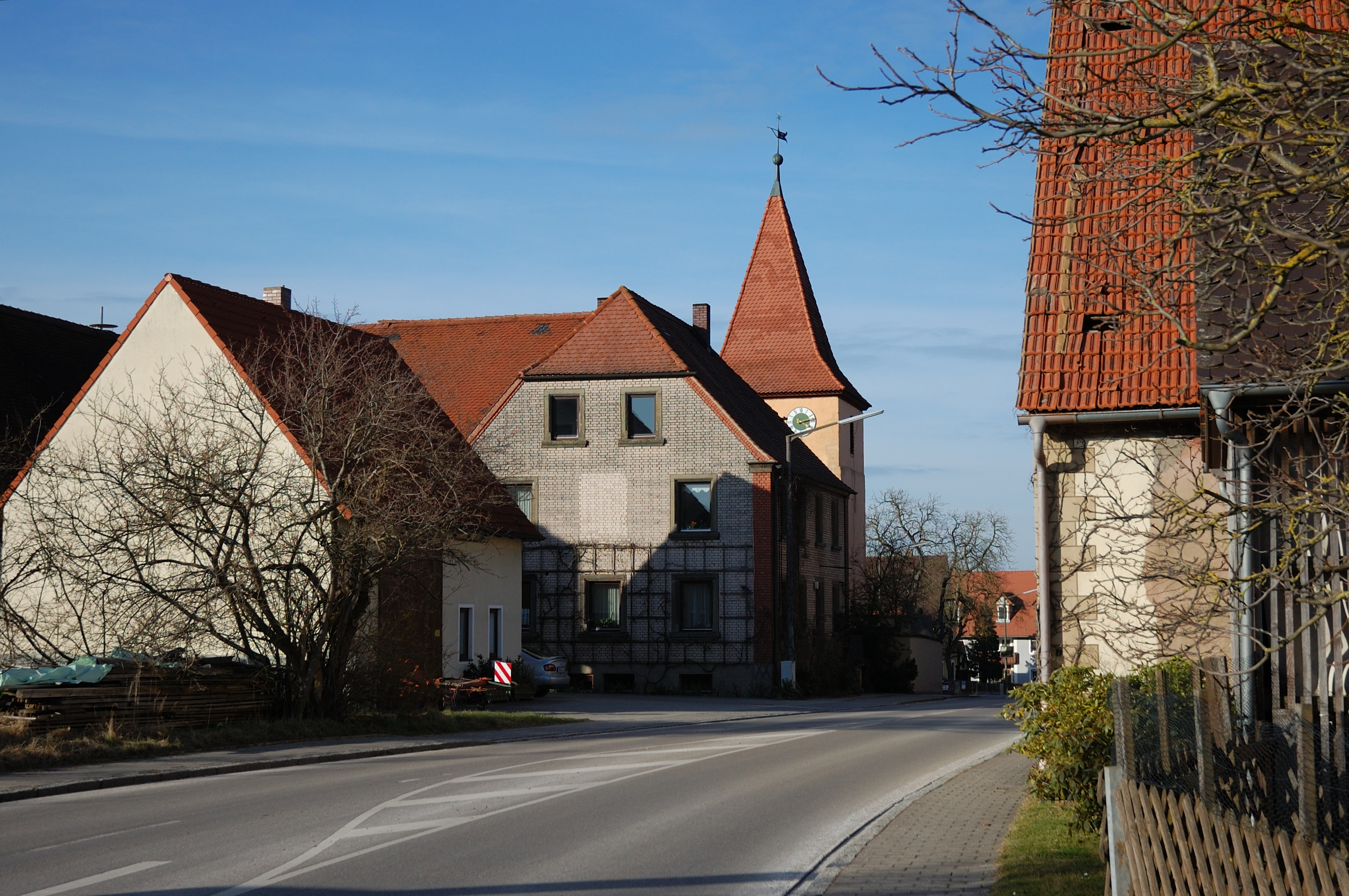 Ortsmitte Reuth mit St. Kunigundkirche